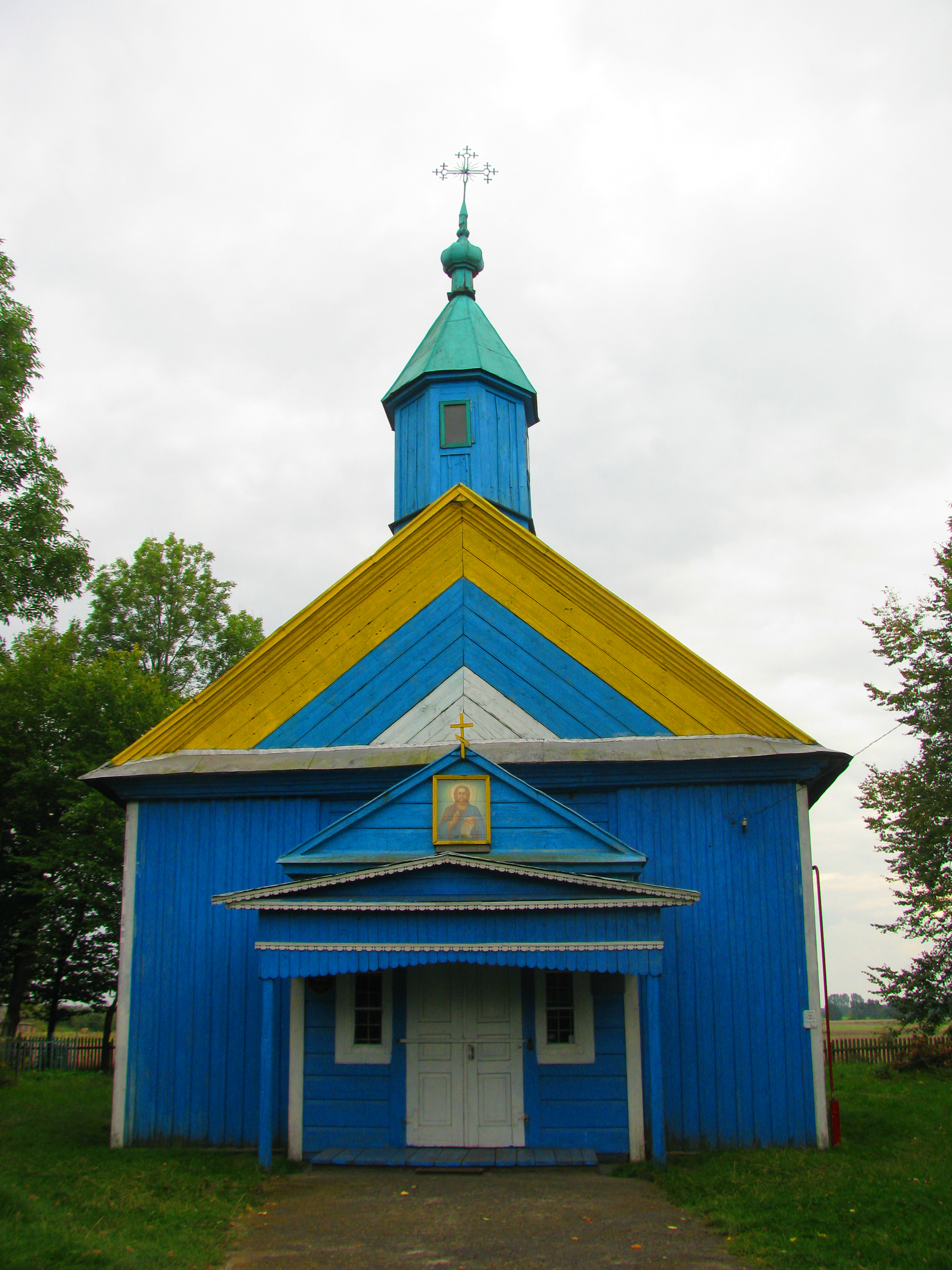 Беларуская (тарашкевіца): Царква Ўсекнавеньня. в. Сакалова This is a photo of Belarusian heritage monument. Reference number: 113Г000147 ( WLM)